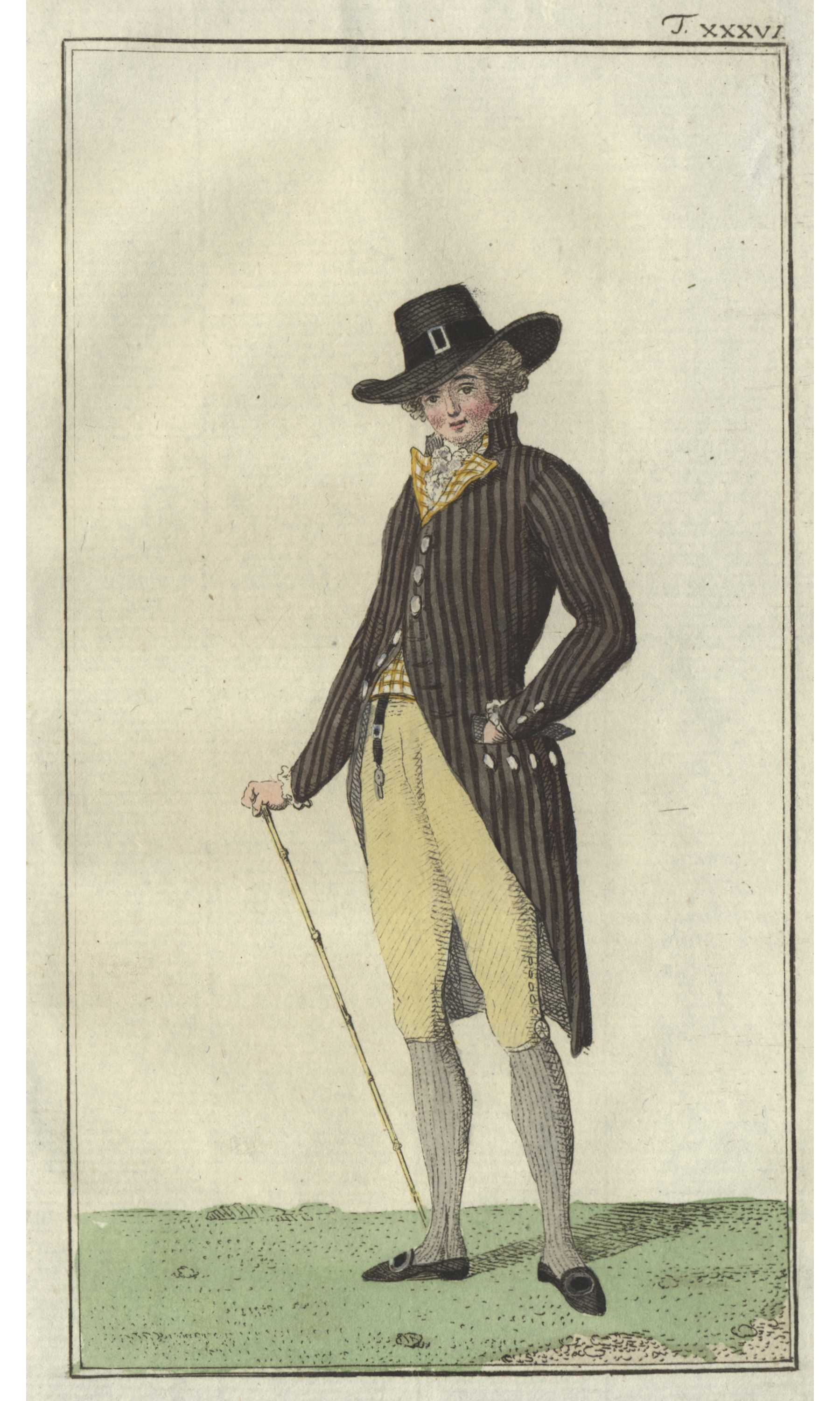 Englischer Herr von neuester Mode